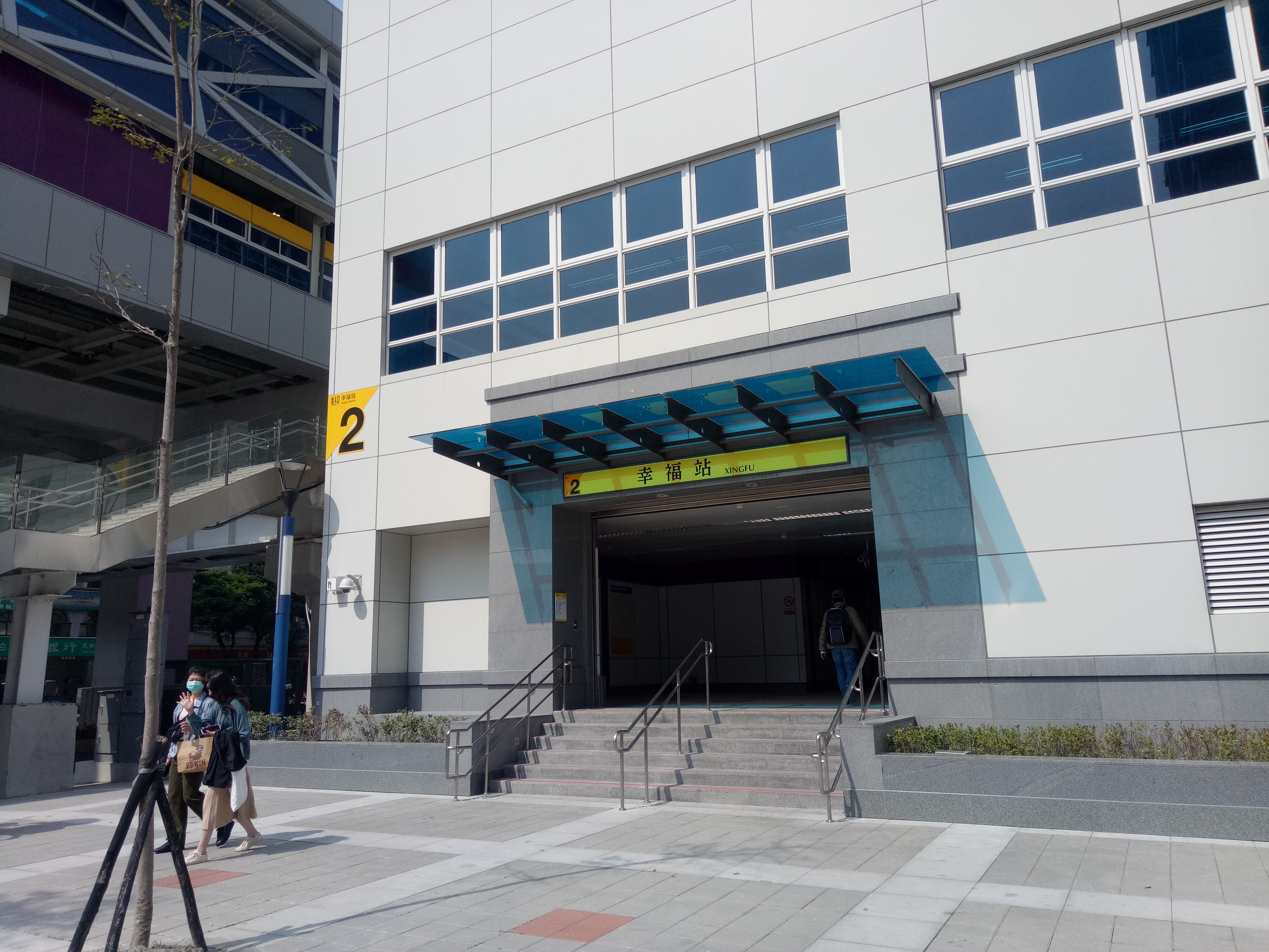 幸福站2號出口。本站位於台灣新北市新莊區市中心東側，是台北捷運環狀線第一階段的捷運車站